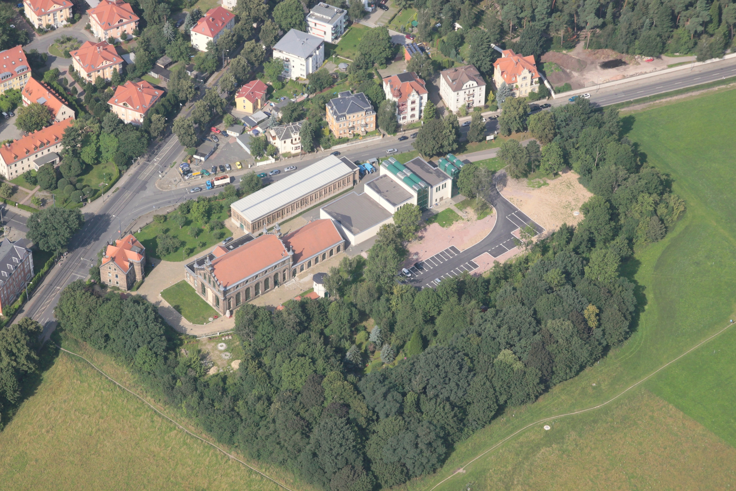 Luftbild vom Wasserwerk Tolkewitz in Dresden. Nach rechts verläuft die Tolkewitzer Straße.